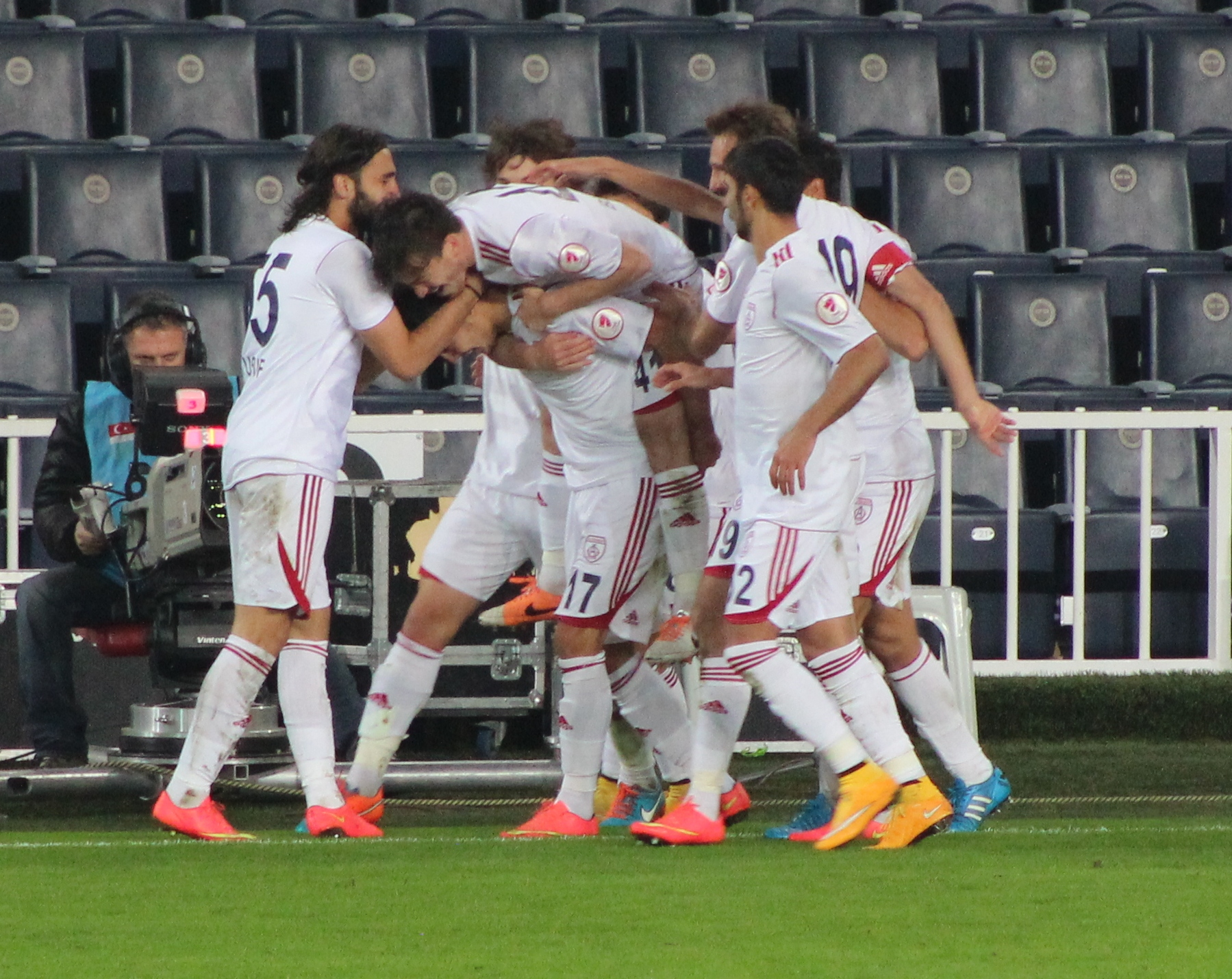 Fenerbahce - Altinordu 23 December 2014 goal celebration